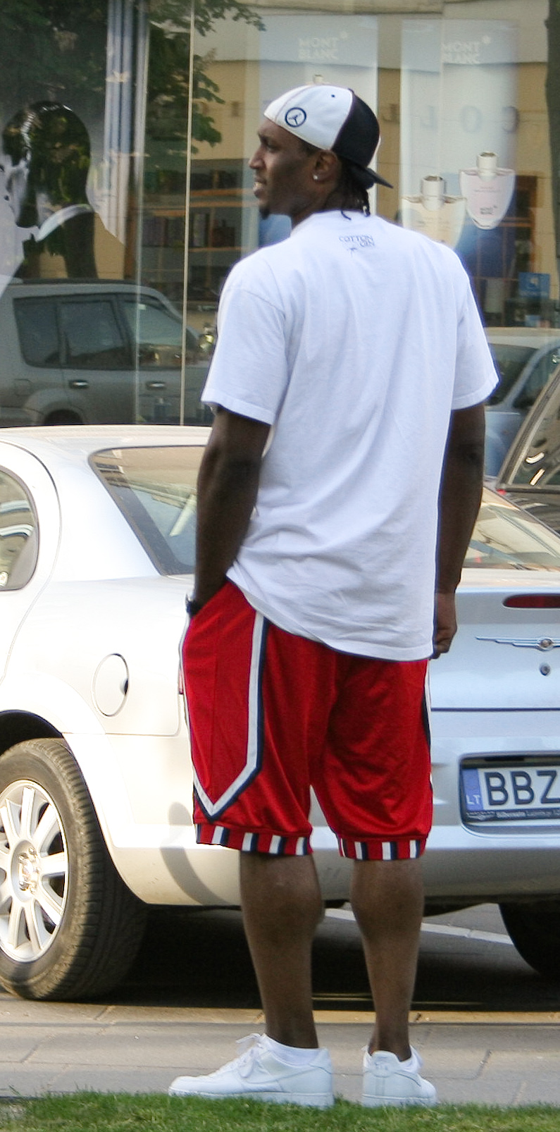 Tanoka Beard, basketball player. Taken in Vilnius, Lithuania.